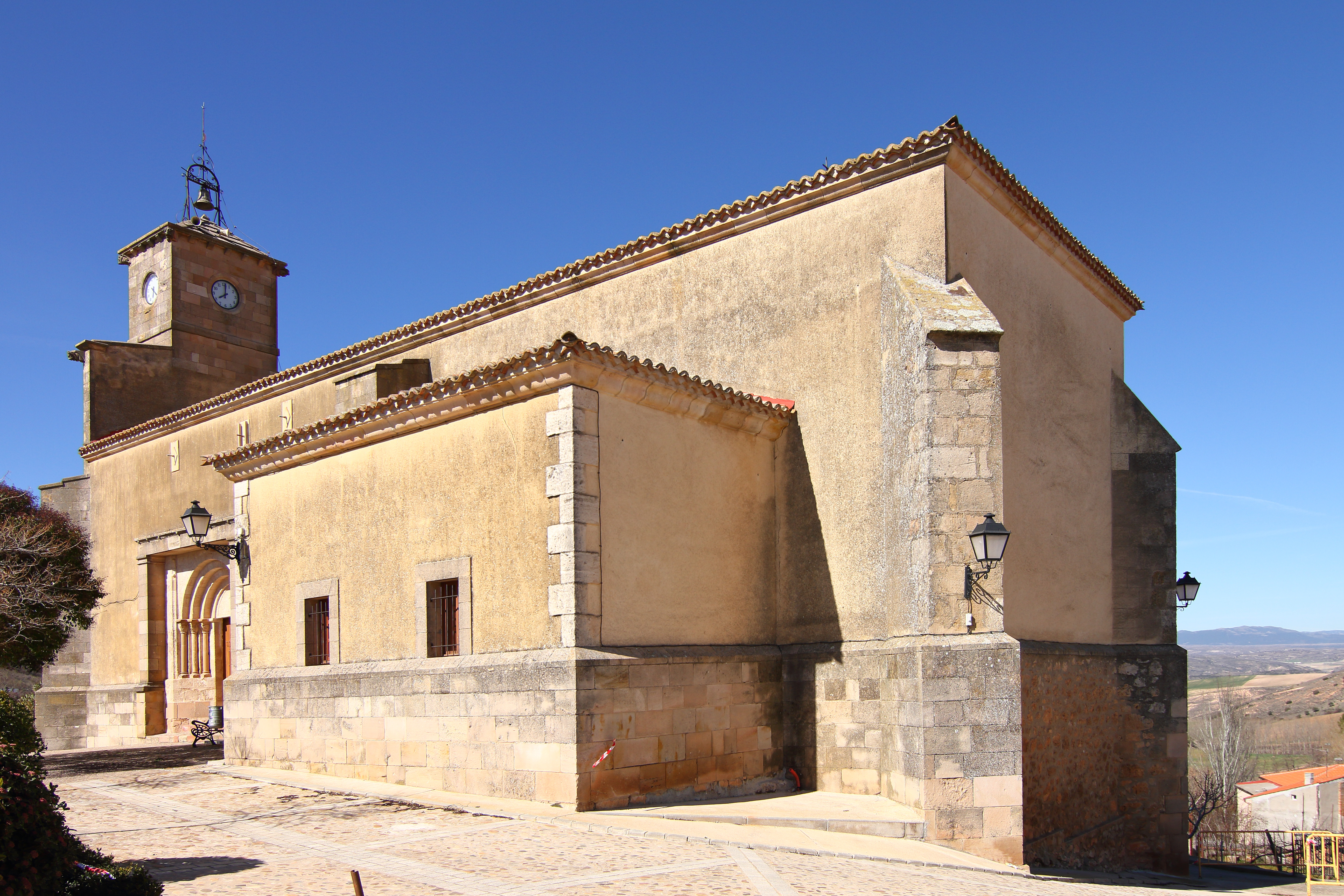 Alarilla, Iglesia parroquial, fachada sur